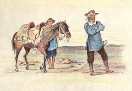 Ramon Torres Mendez, Llanero militar Album de cuadros de costumbres